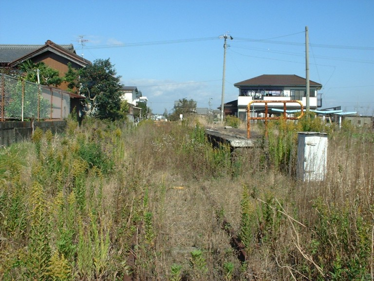 名鉄竹鼻線（大須線）市之枝駅跡 路盤上からホーム跡を北望